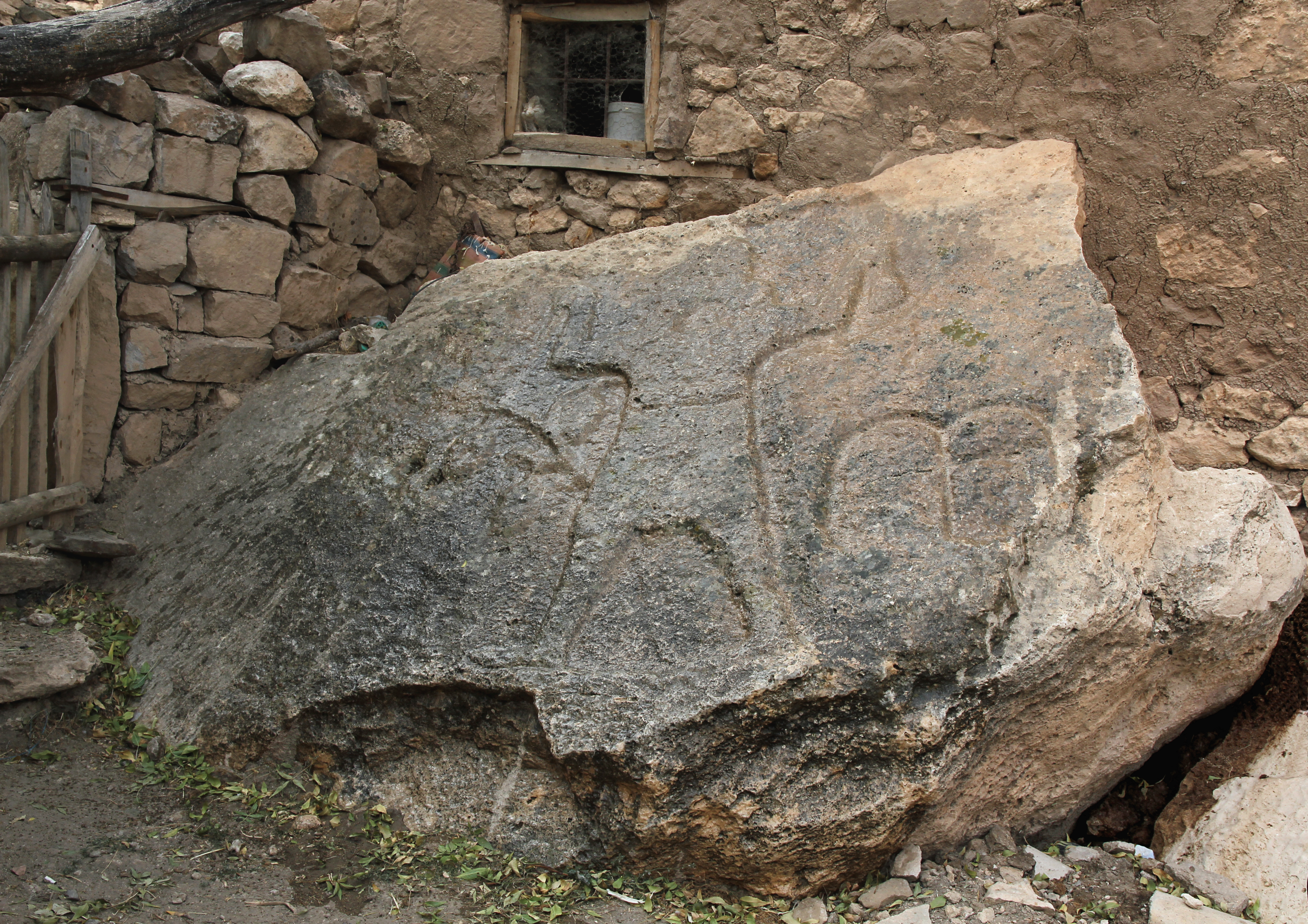 Späthethitisches Felsrelief des Tarhunzas in Gökbez, Südtürkei